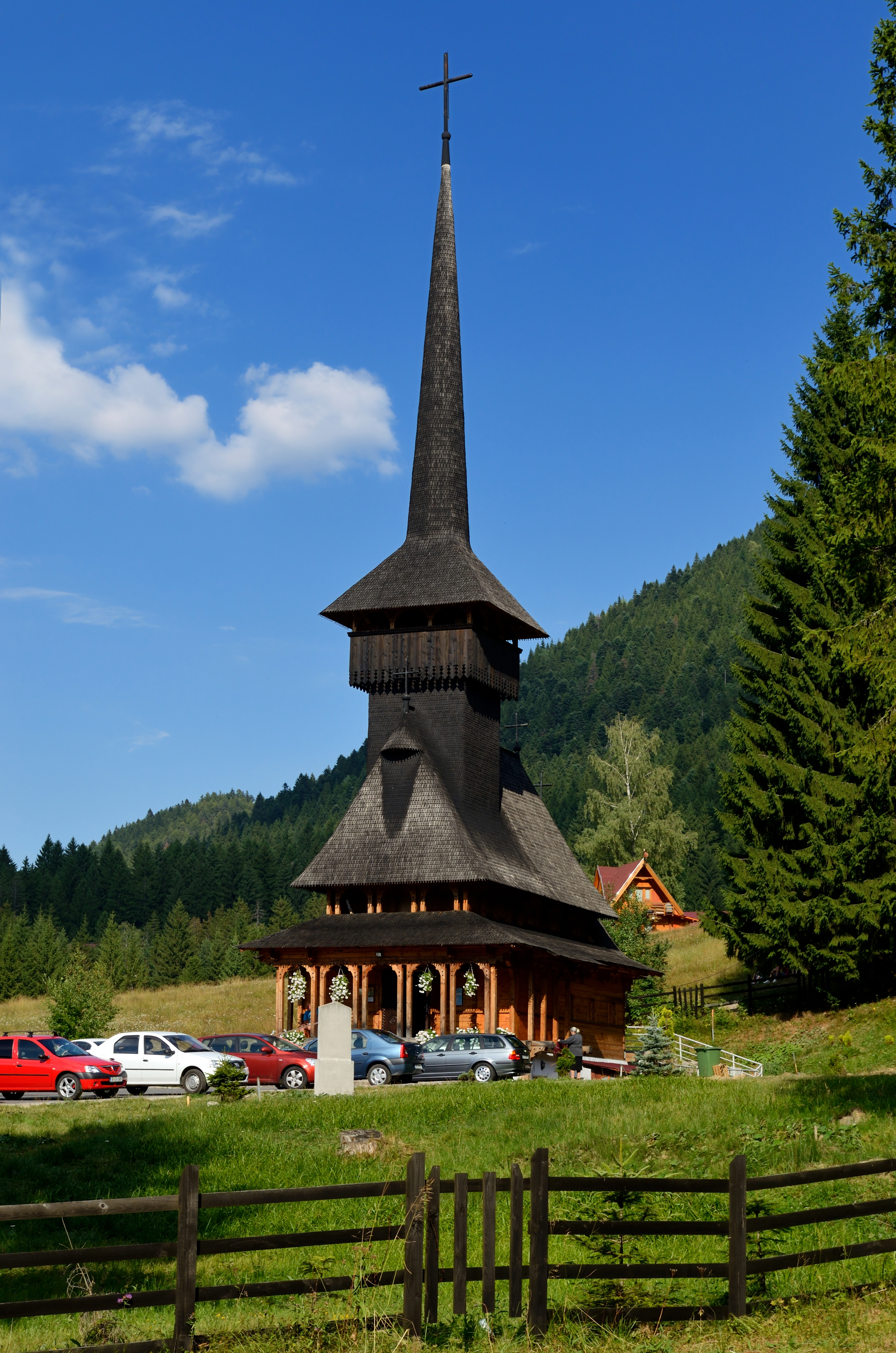 Српски (ћирилица): Црква брвнара посвећена Светом Јовану Крститељу у Појани Брашов